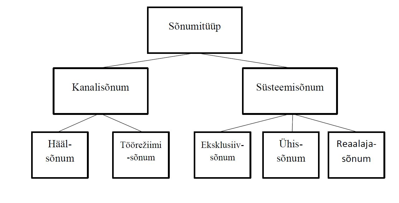 MIDI sõnumitüüpide diagramm